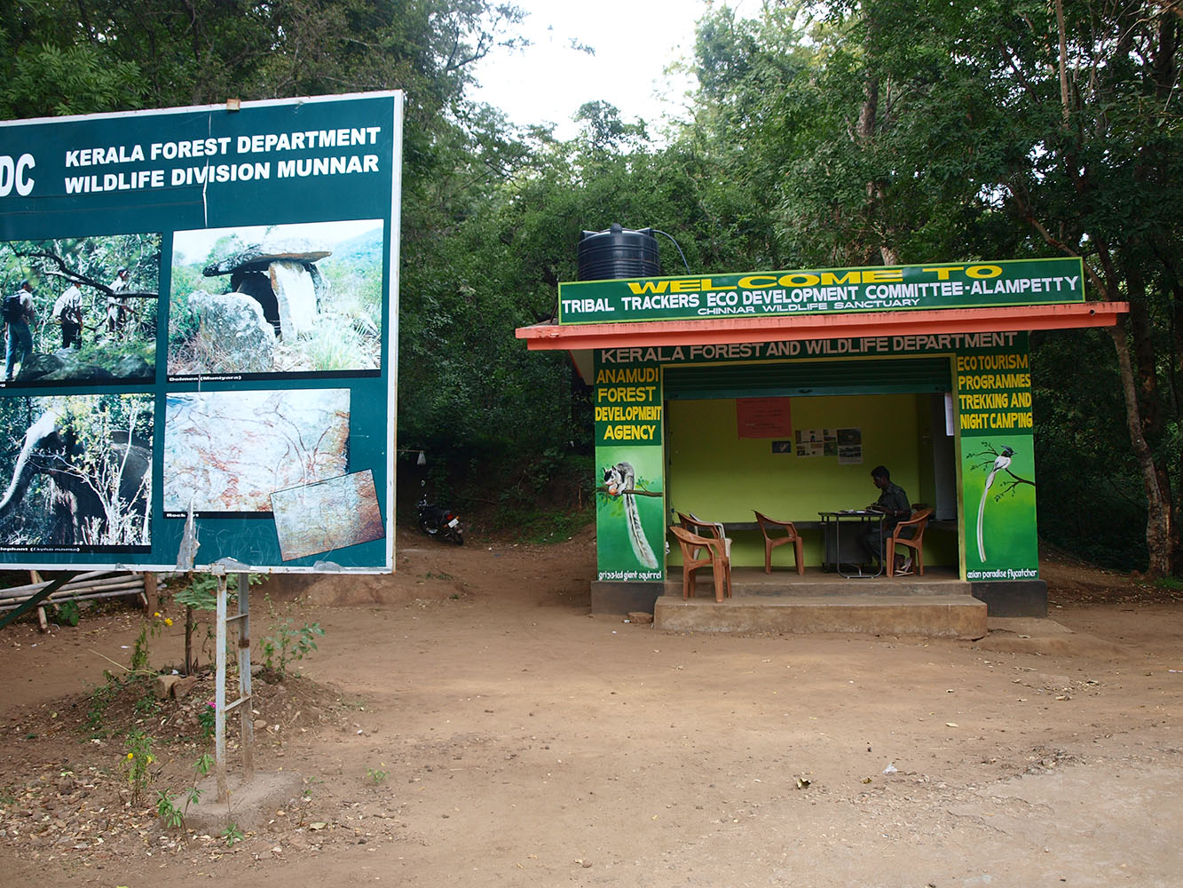 ചിന്നാര്‍ വന്യജീവി സങ്കേതത്തിലേക്കുള്ള ട്രക്കിംഗിന് പുറപ്പെടുന്ന സ്ഥലം.